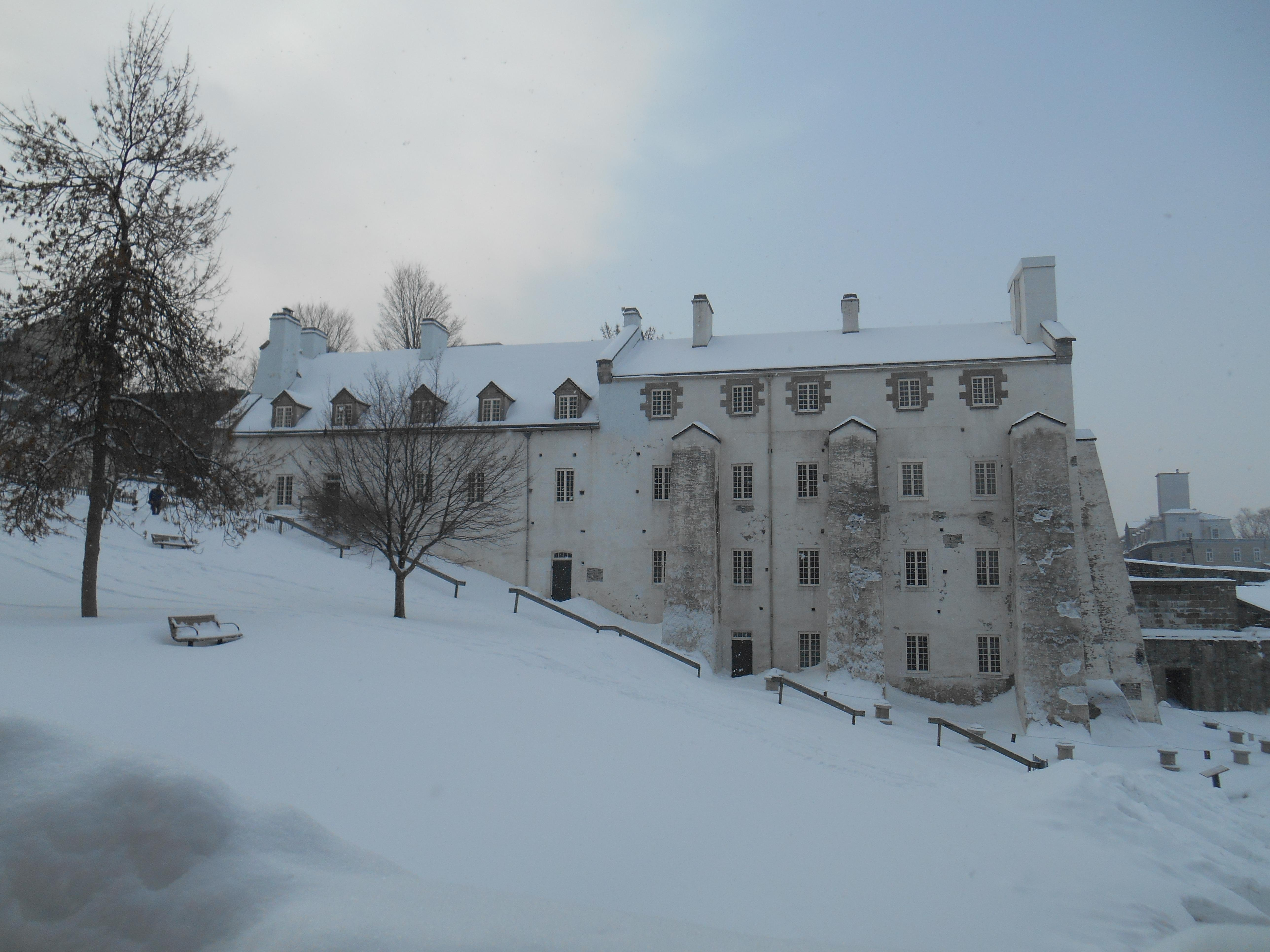 Redoute Dauphine, 22 'A', rue McMahon, Québec, Québec, Canada « La redoute Dauphine est un grand bâtiment à toit à deux versants sis bien en vue dans le site patrimonial du Parc-de-l'Artillerie, dans le lieu historique national du Canada des Fortifications-de-Québec, dans le secteur historique du Vieux-Québec. Épousant la déclivité du terrain, l’ouvrage est en deux sections, l’une de trois étages et l’autre de quatre, dont les murs en maçonnerie et enduits de crépi sont percés de fenêtres à carreaux multiples disposées de façon symétrique. Le bâtiment, qui est typique de l’architecture québécoise traditionnelle, présente des encadrements en pierre de taille autour des ouvertures des lucarnes à pignons, des cheminées de maçonnerie, un toit revêtu de bardeaux de bois et un toit à couverture métallique. La façade est présente de hauts contreforts en pierre, coiffés d’un pignon qui distingue le bâtiment dans le paysage urbain. » – historicplaces.ca